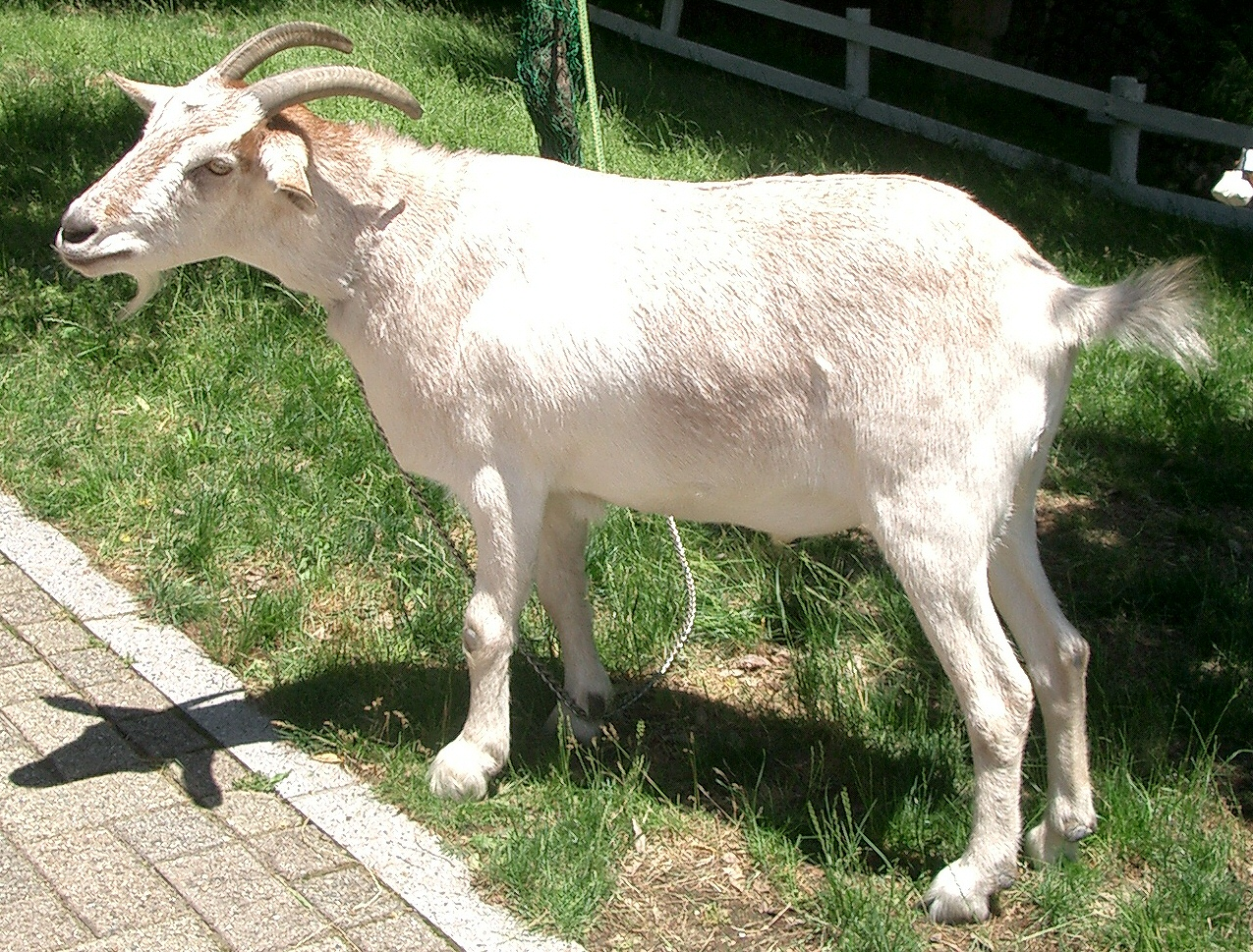 山羊（2004/6/13六甲牧場にて撮影）)